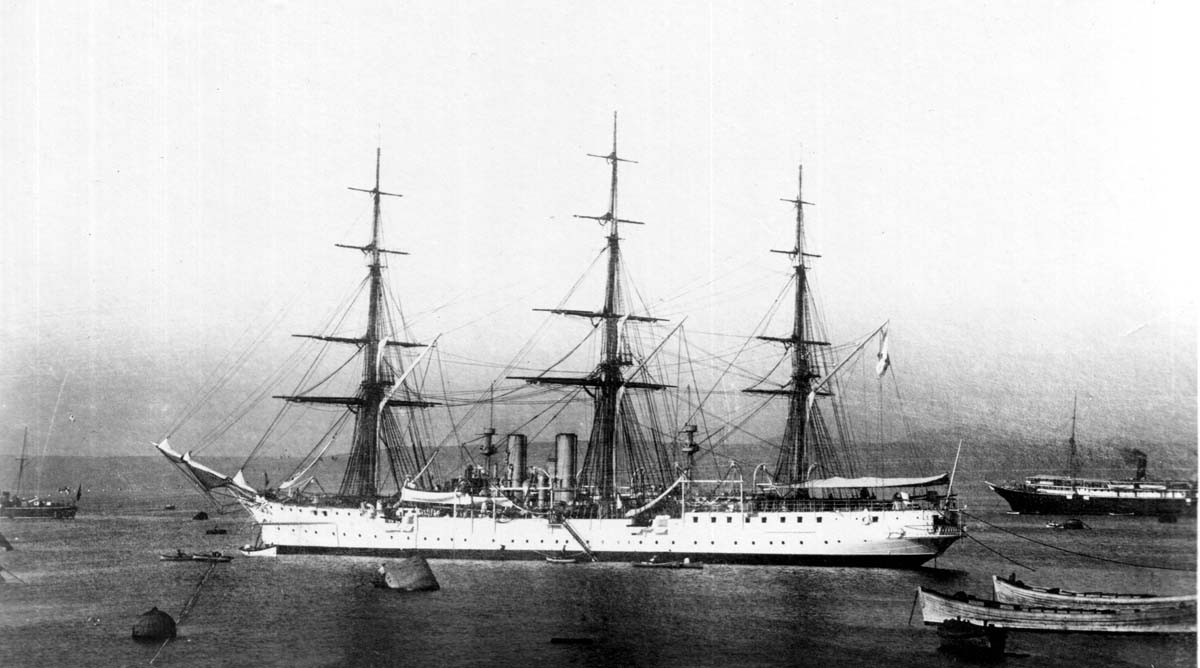 Fotografía de la fragata argentina Sarmiento en Valparaíso el año 1899, durante su primer viaje.